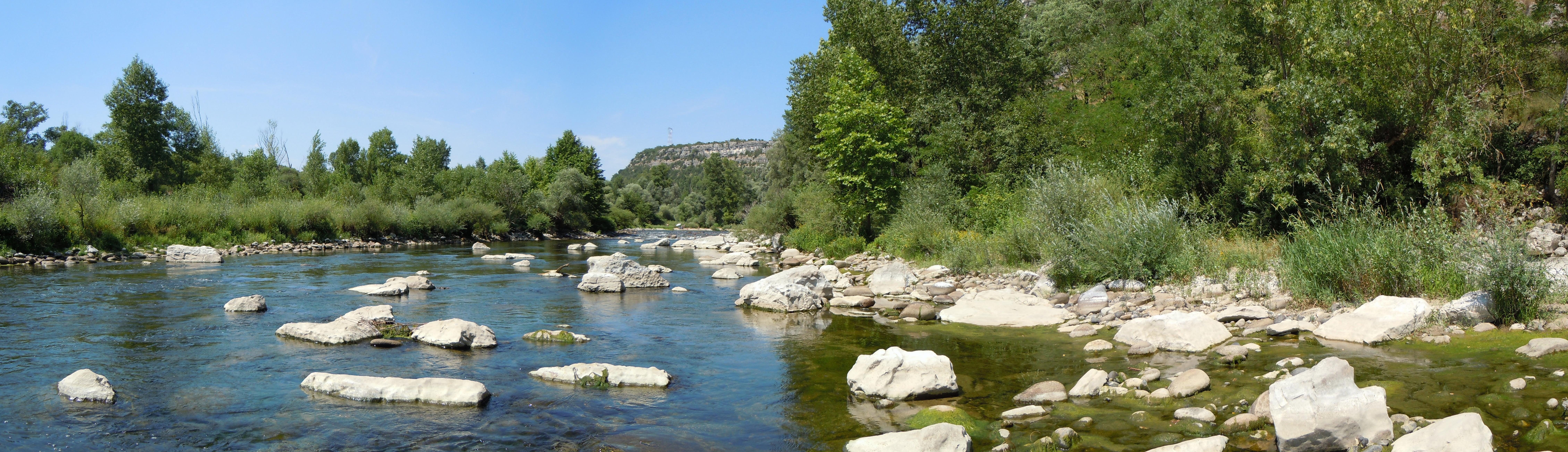 Vogüé - Ardèche (France) - Ripisylve et lit majeur de l'Ardèche